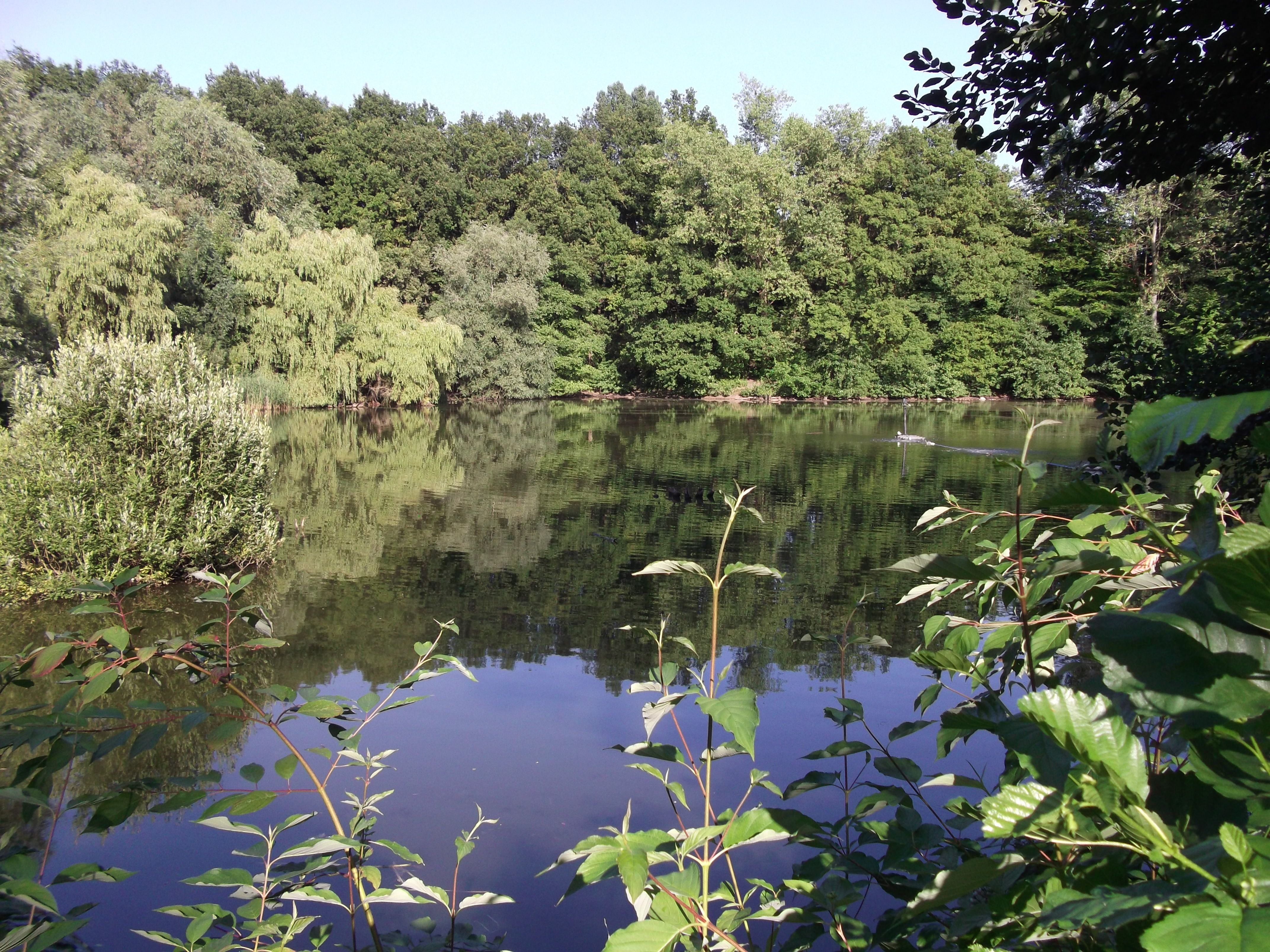 Ziegeleiteich in Osdorf (südlich des EEZ am Wanderweg Richtung Klein Flottbek)